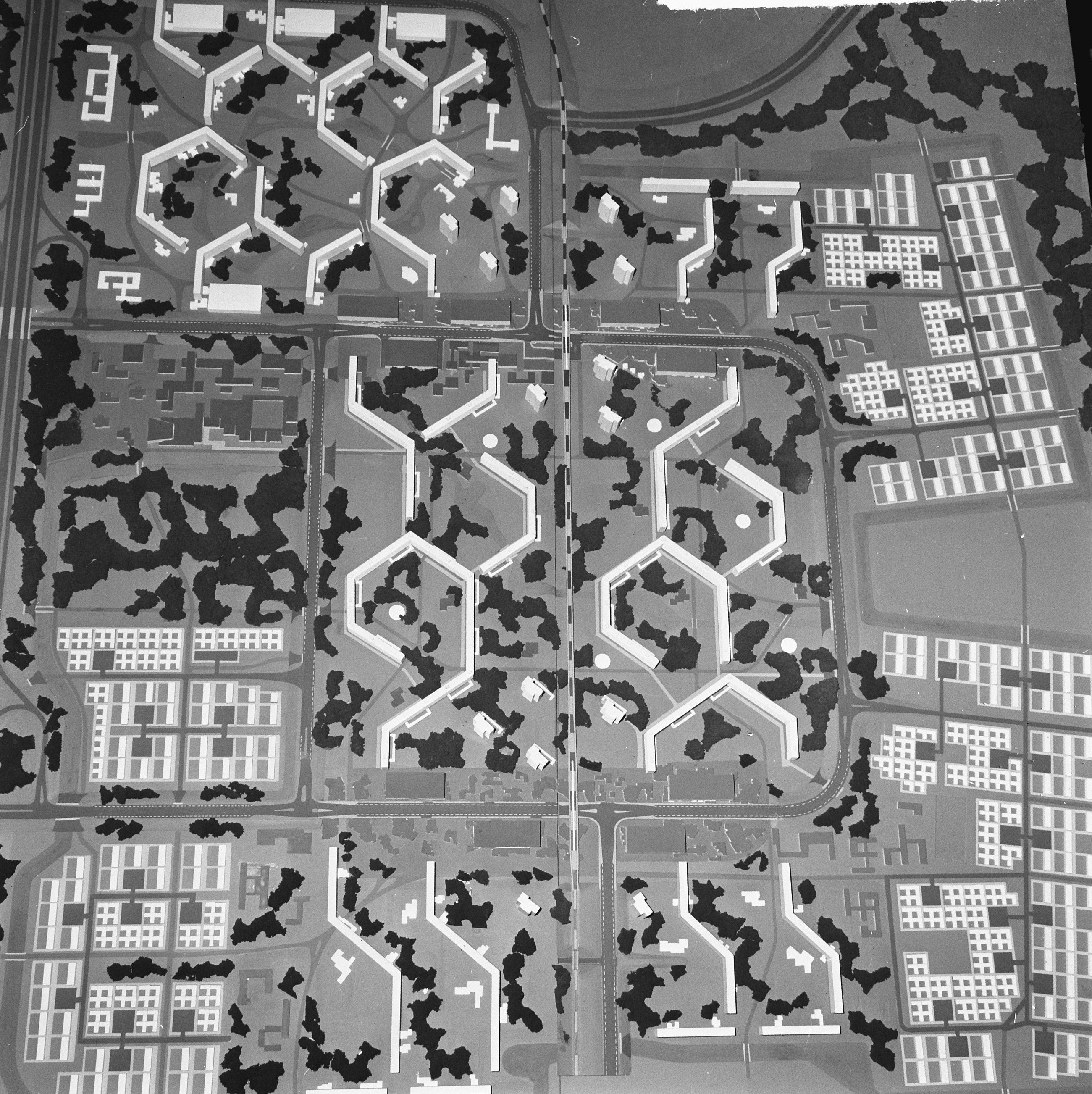 Collectie / Archief : Fotocollectie Anefo Reportage / Serie : [ onbekend ] Beschrijving : Zuidoostelijke stadsuitbreiding van Amsterdam, maquette zuidoostelijk stadsdeel Datum : 3 juni 1965 Locatie : Amsterdam, Noord-Holland Trefwoorden : Stadsuitbreidingen, maquettes Fotograaf : Evers, Joost / Anefo Auteursrechthebbende : Nationaal Archief Materiaalsoort : Negatief (zwart/wit) Nummer archiefinventaris : bekijk toegang 2.24.01.03 Bestanddeelnummer : 917-8365